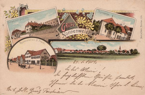 Ansichtskarte von Nonnenweier mit Synagoge, datiert mit 24.1.1904